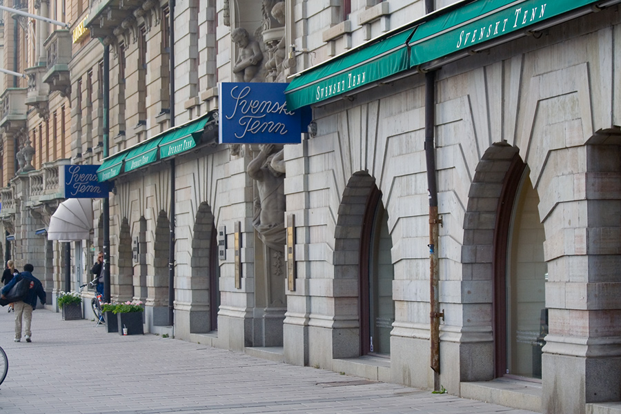 Geschäft Svenskt Tenn, Stockholm, Strandvägen